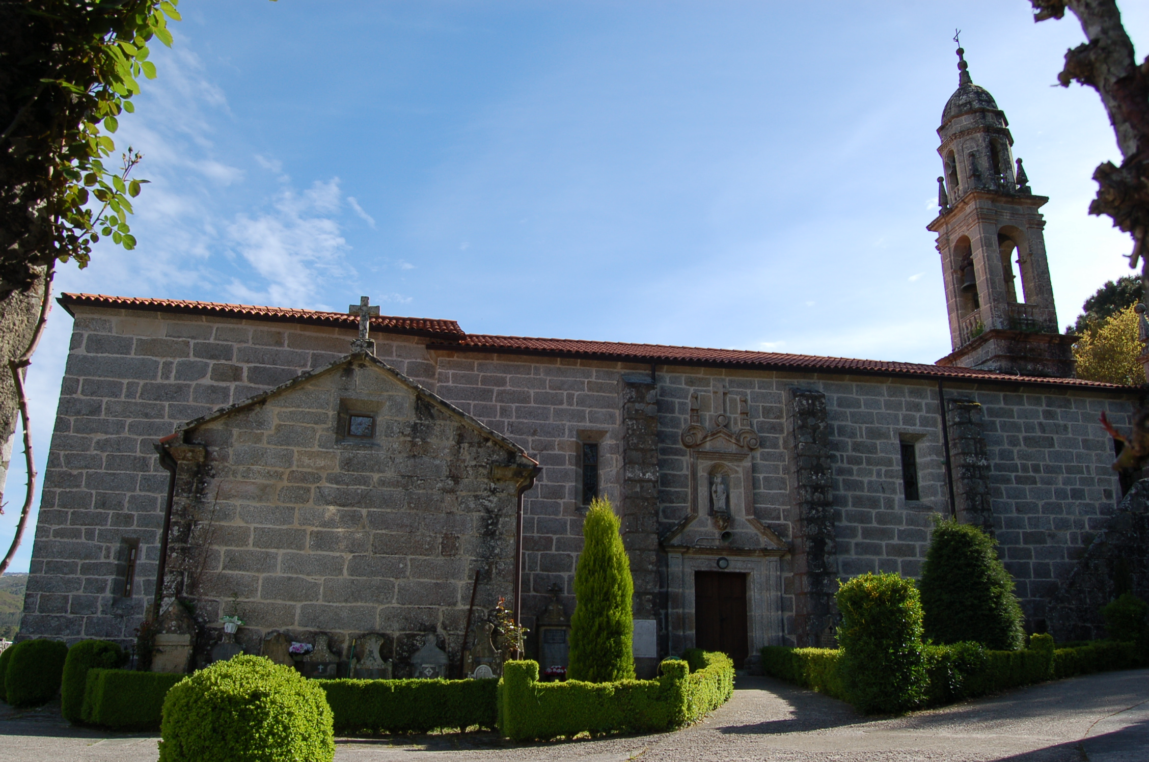 Igrexa parroquial de Santa Mariña de Abelenda, no concello de Avión